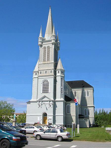 Een van de mooiste Acadian kerken is St. Mary’s Church at Pointe de l’Église (Church Point). Het is een ingenieurs meesterwerk en werd gebouwd tussen 1903 en 1905 in de vorm van een kruis, 58 m lang en 41 m breed. De toren steekt 56 m uit boven het omringende landschap. St. Mary’s Church bevind zich op de campus van Université Sainte-Anne, een centrum van Acadian cultuur en Nova Scotia’s enige Franstalige universiteit